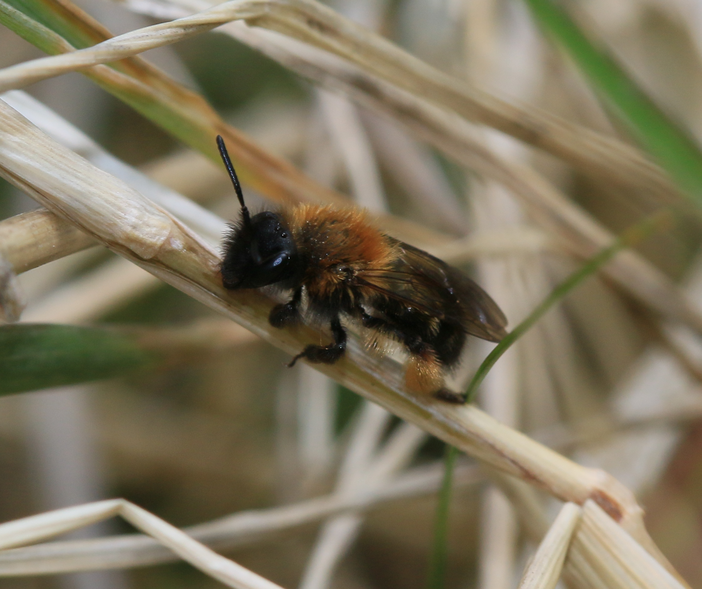 Andrena (Euandrena) bicolor (female)